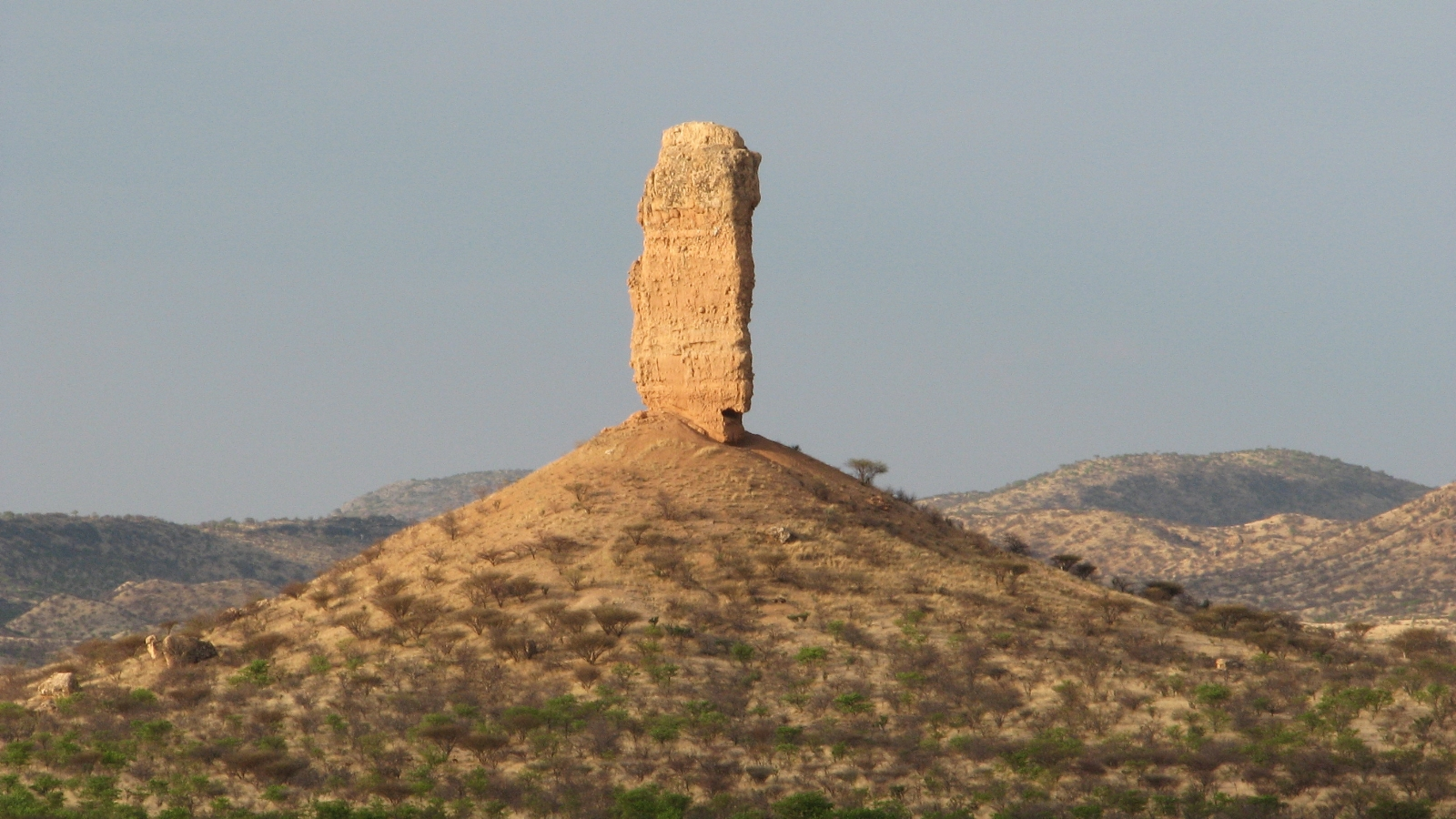 Fingerklippe von der Vingerklip-Lodge aus gesehen